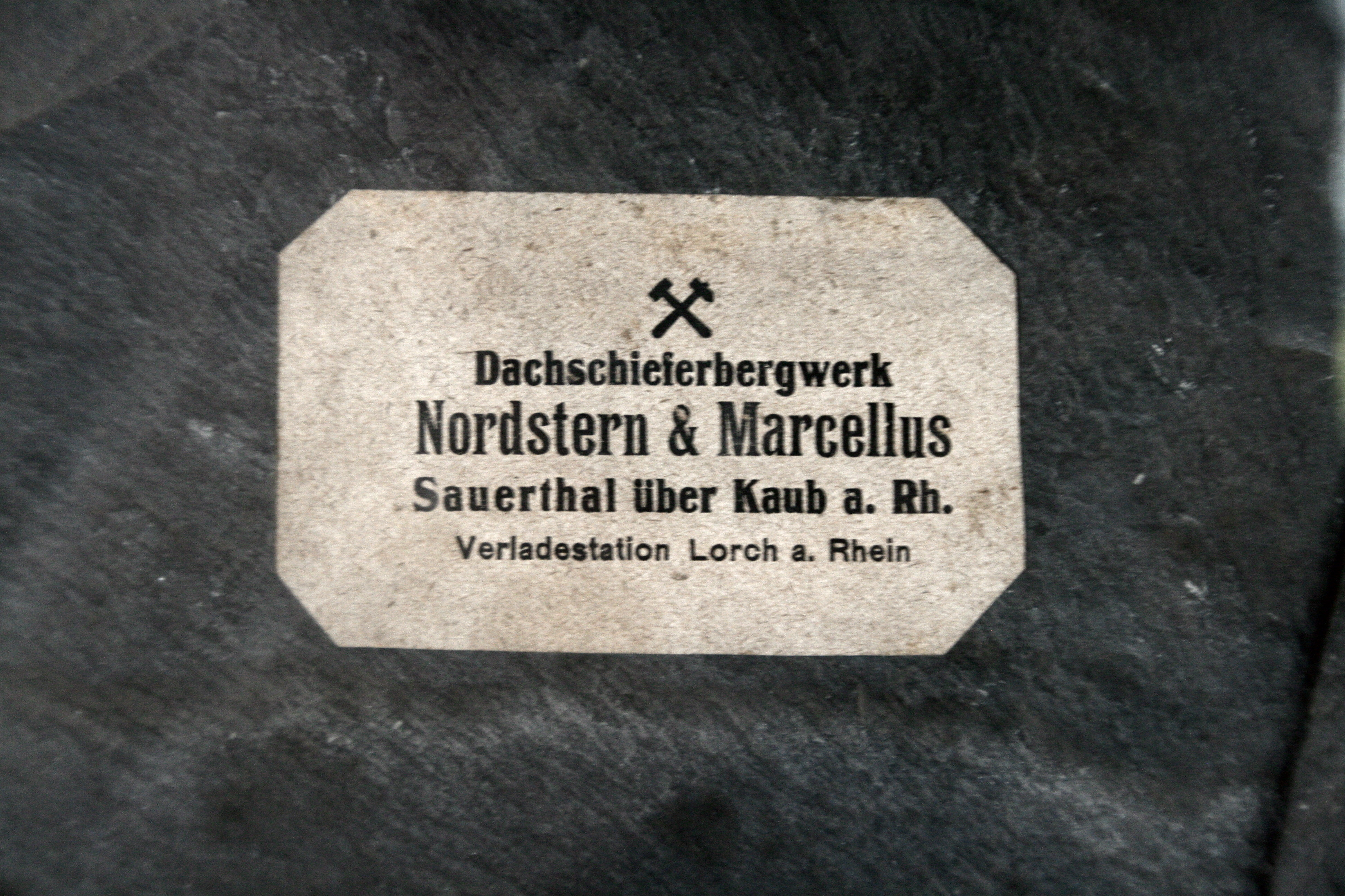 Schieferprobe des Dachschieferbergwerkes Nordstern & Marcellus in Sauerthal, Rhein-Lahn-Kreis. Der Betrieb wurde 1953 eingestellt.